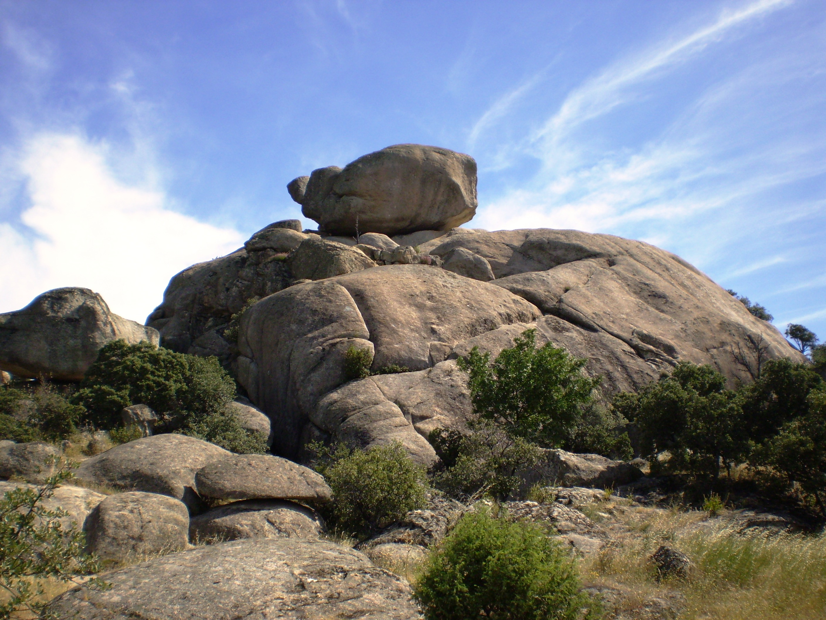 Roca natural del Canto de la Cueva. Torrelodones, Madrid, Spain